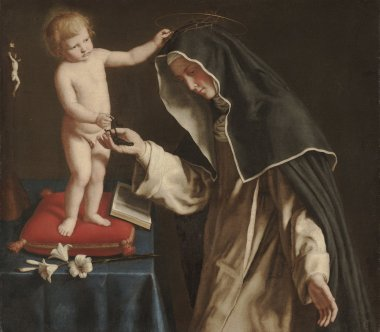 St. Catherine of Siena with the Christ Child // L'opera di Sassoferrato è oggi nella collezione italiana della Fondazione Cavallini Sgarbi (Ferrara). Fonte: La Collezione Cavallini Sgarbi. Da Niccolò dell’Arca a Gaetano Previati. Tesori d’arte per Ferrara, a cura di a cura di Pietro Di Natale, 2018, pp. 214- 215.